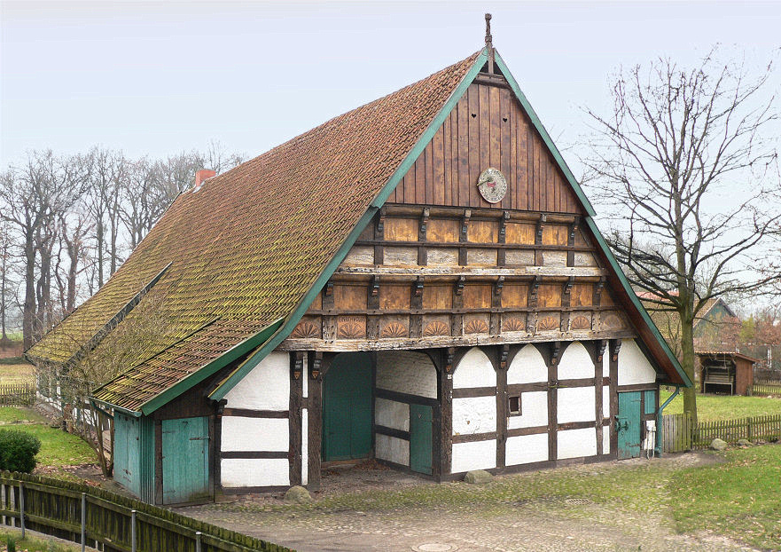 Norddeutsches Bauernhausmuseum Wöhler Dusche Hof in Isernhagen. Das Haus ist ein Zweiständer-Hallenhaus.